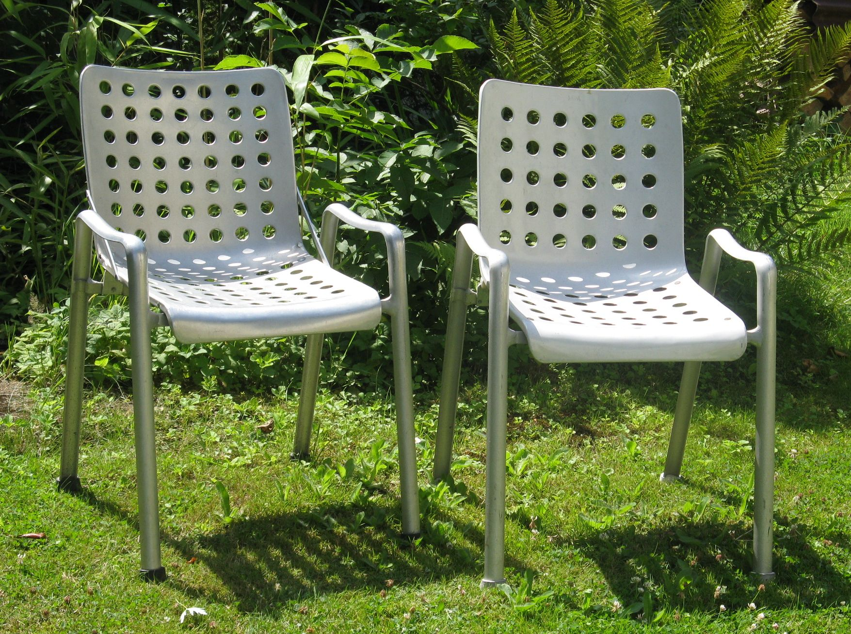 zwei Landi-Stühle; links: ältere Version (mit Streben repariert); rechts: jüngere Version